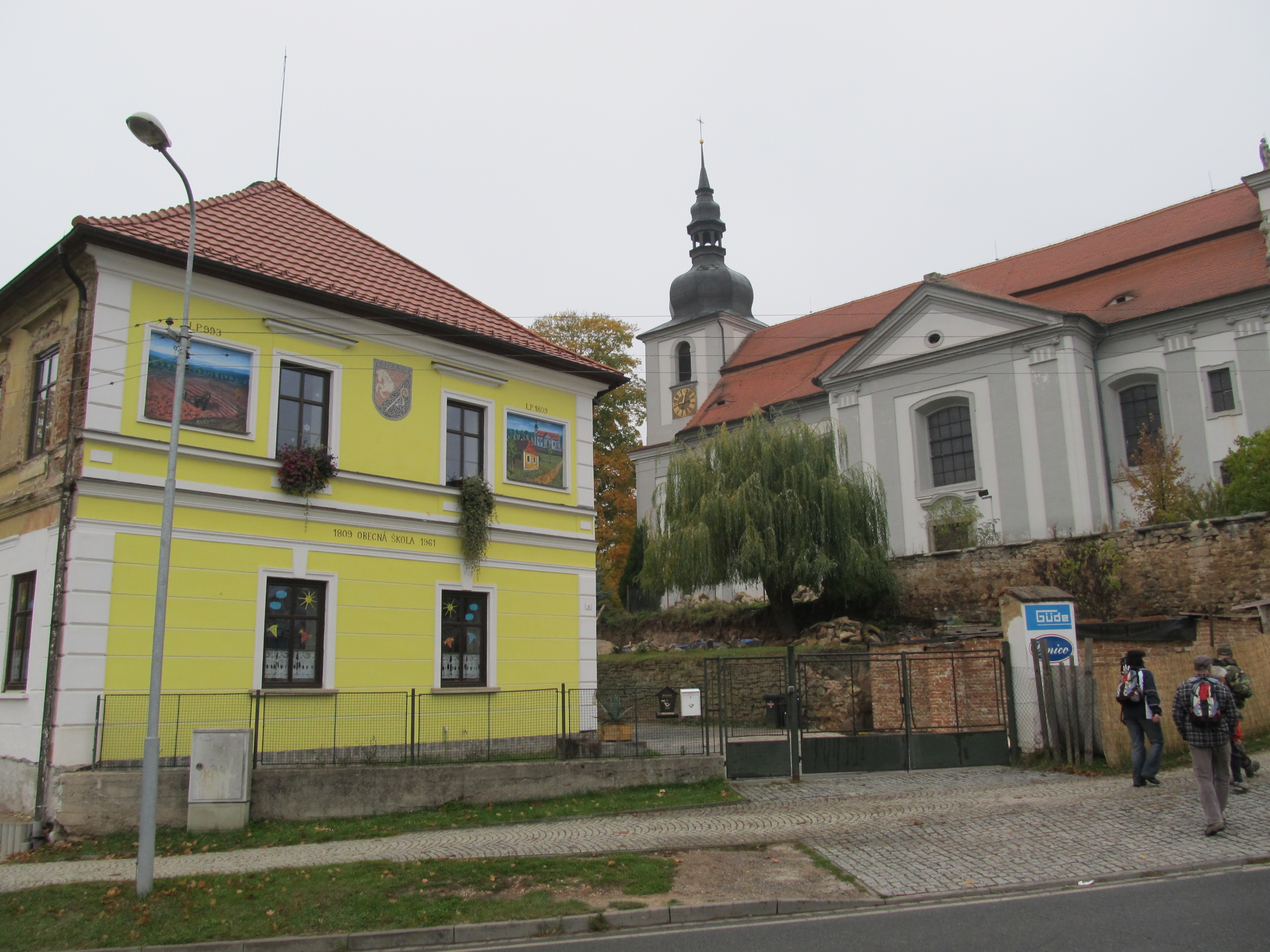 Vejprnice - Stará škola a kostel sv. Vojtěcha